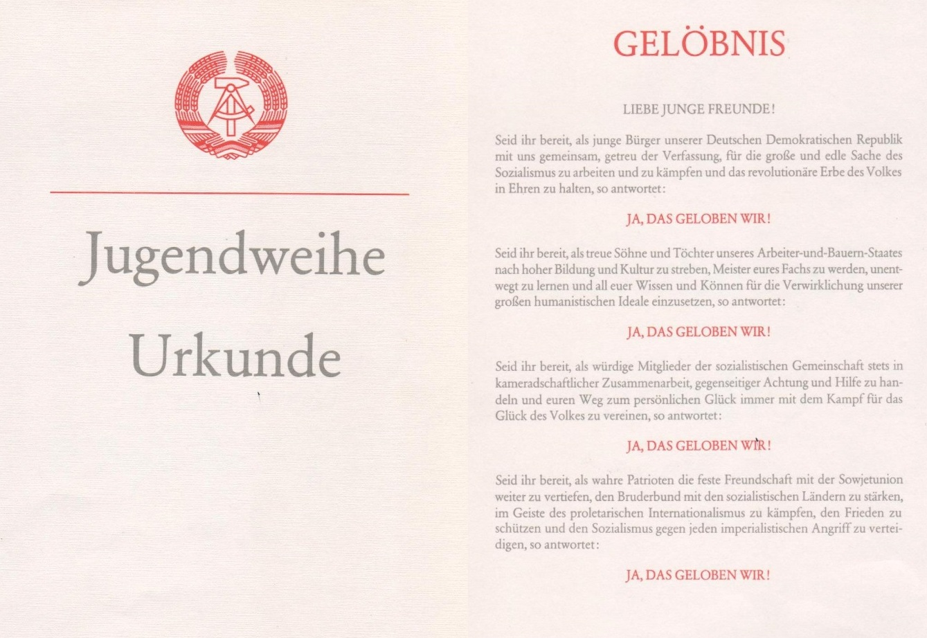 Urkunde zur DDR-Jugendweihe aus dem Jahre 1986. Das Gelöbnis wurde vorgetragen, die Weihlinge sprachen anschließend im Chor: "Ja das geloben wir"